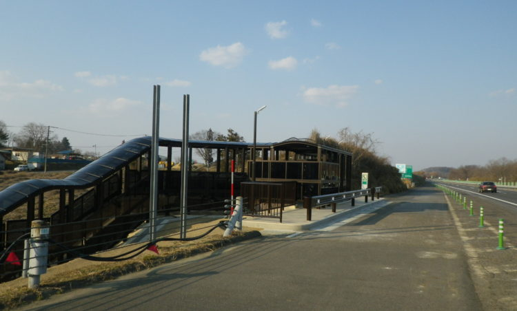 平成工業が2019/03/05にサイトを更新したときに付属していた写真